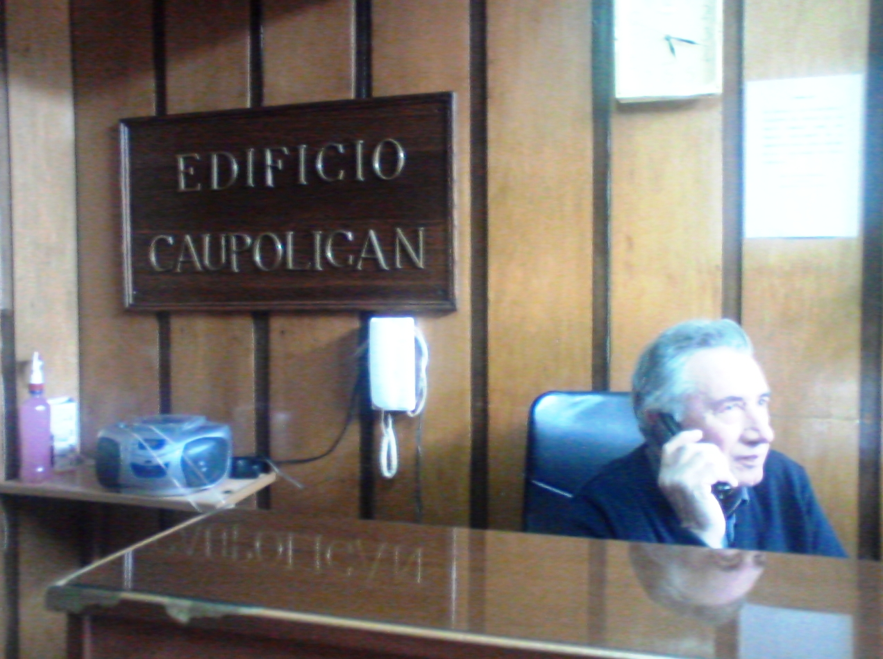 Hall de acceso del edificio Torre Caupolicán de la ciudad de Temuco, Chile.